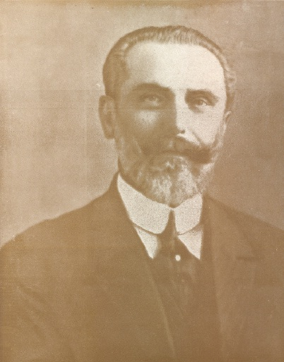 Fotografía de principios del s. XX de Rafael Ariztía Lyon, fundador de la Universidad Católica de Valparaíso, senador, regidor y colaborador del Instituto Rafael Ariztía de Quillota.